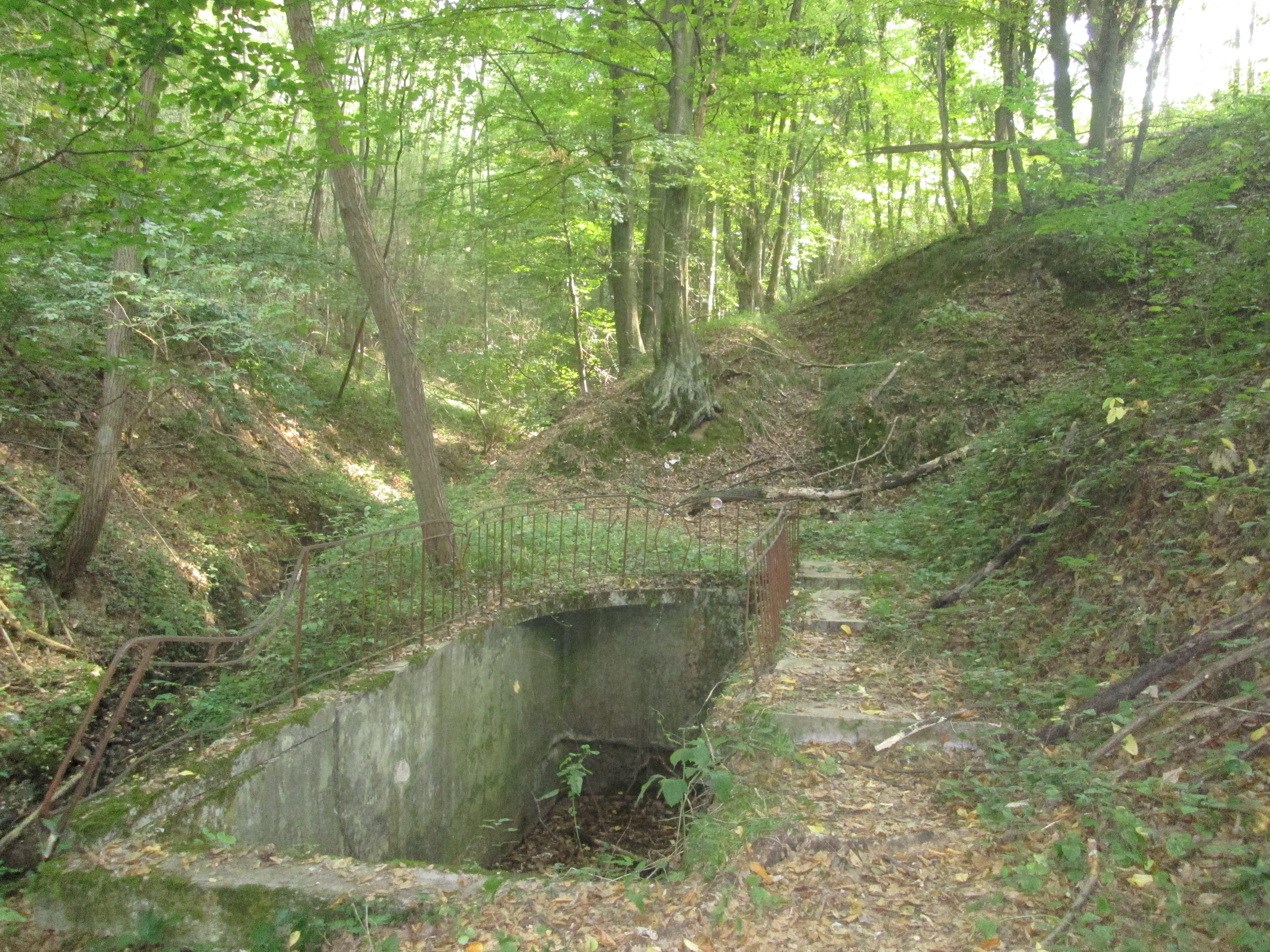 Српски (ћирилица): Базен и резервоари на извору Кисела вода у Мирашевачкој бањи